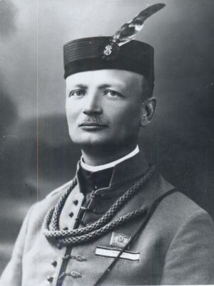 Jan Čapek